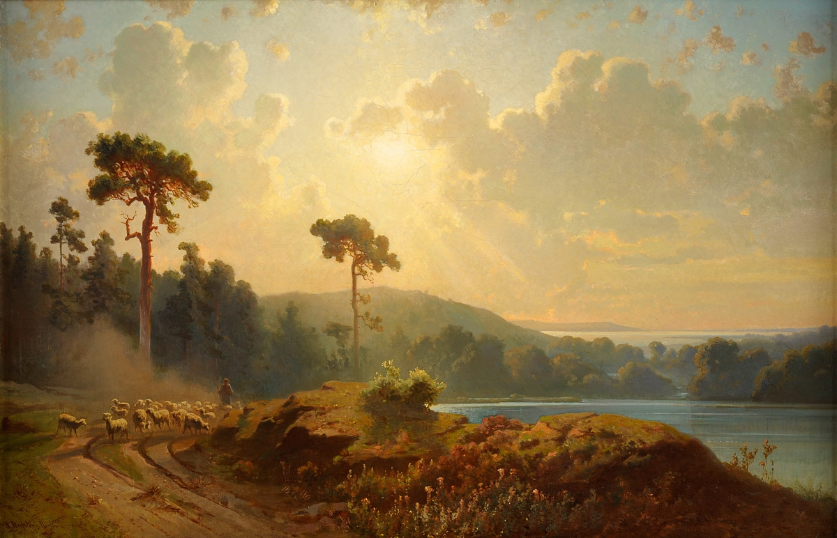 Seenlandschaft. Signiert. Datiert: Berlin (18) 68. Öl auf Leinwand, 46 x 72 cm.